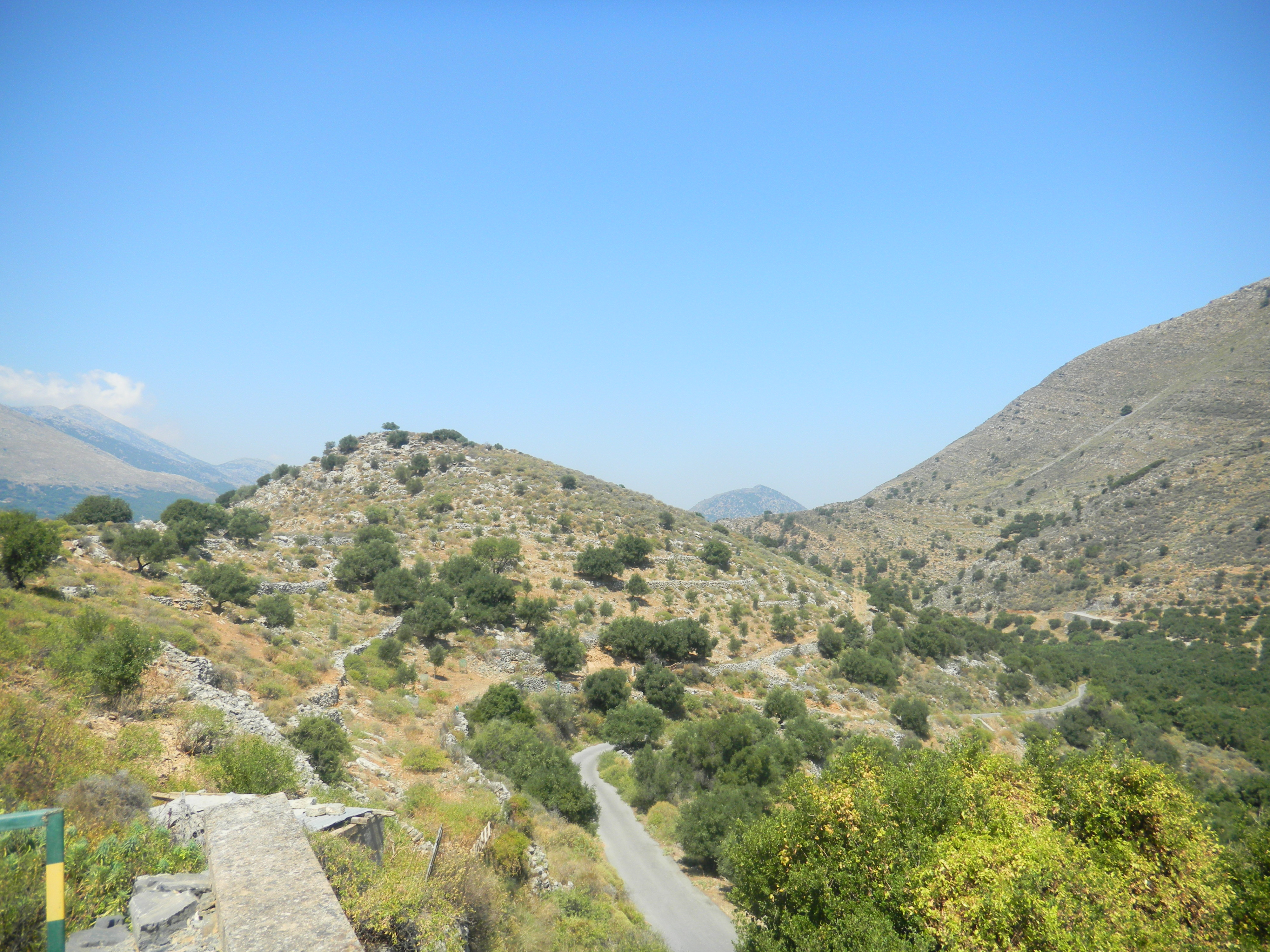 Dreros archaeological site, Crete